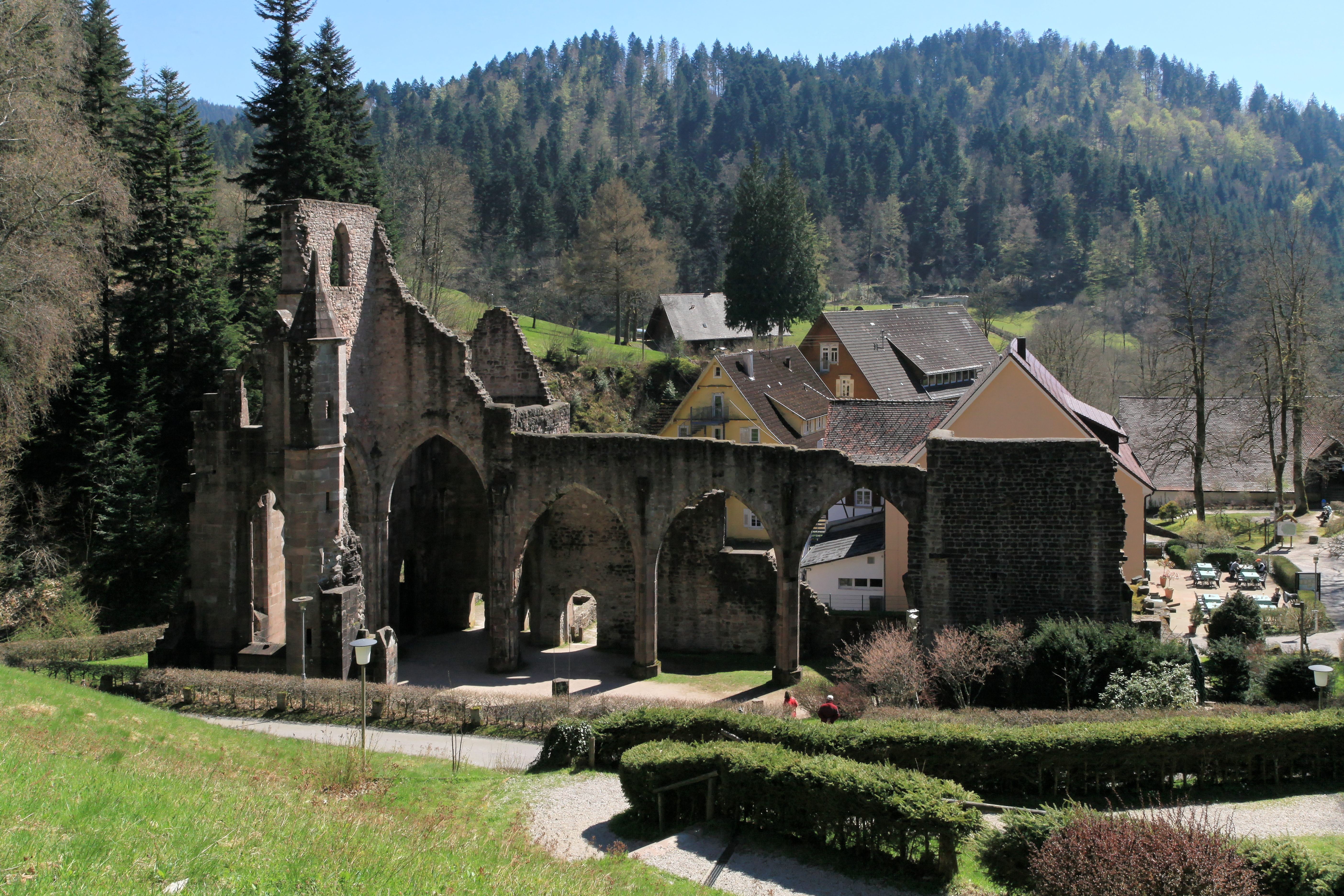 Allerheiligen mit Kloster Allerheiligen in Oppenau